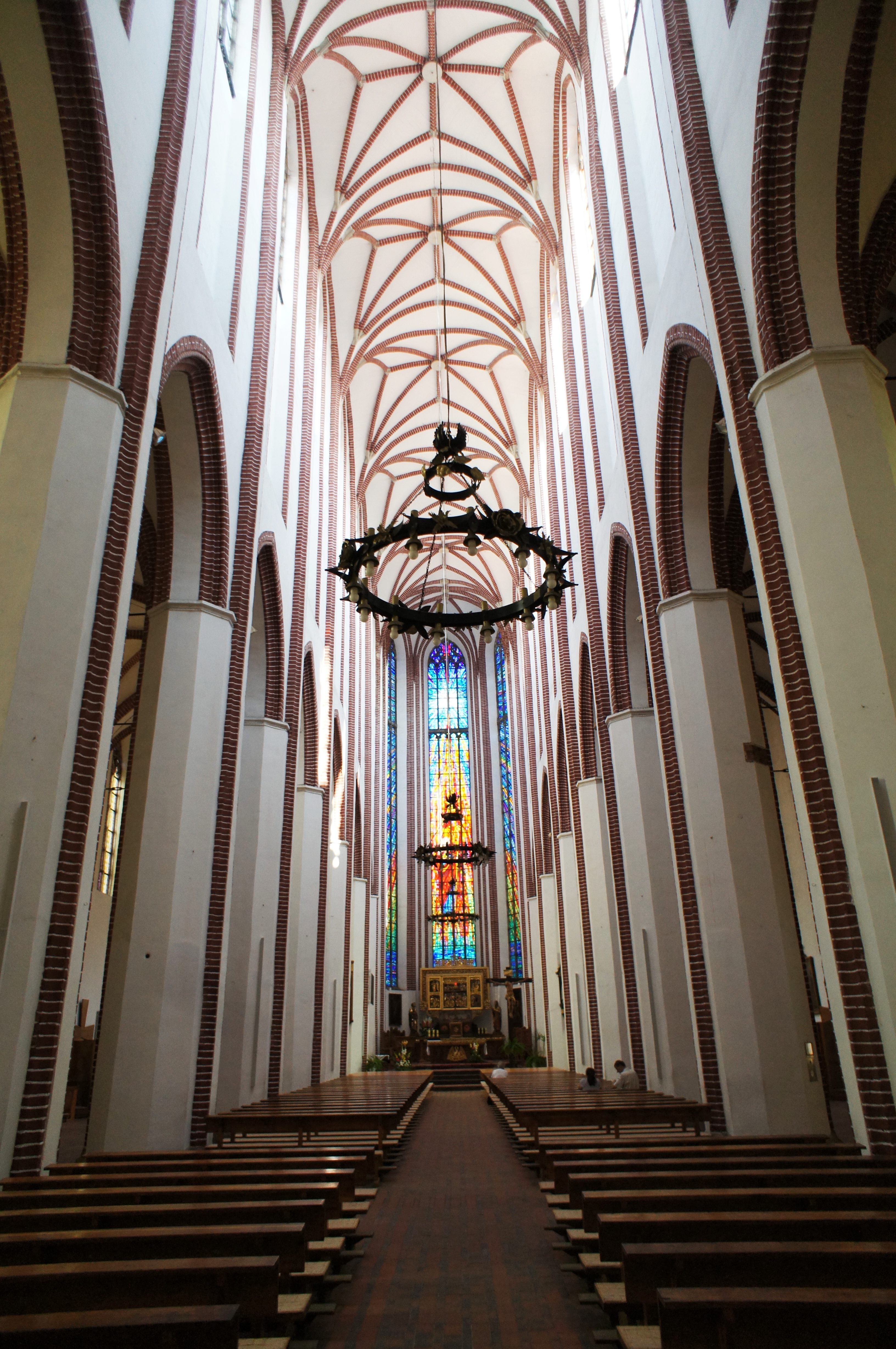 Wnętrze kościoła par. p.w. św. Mikołaja w Brzegu (zabytek nr 55 z 29.03.1949; 515/58 z 15.11.1958)